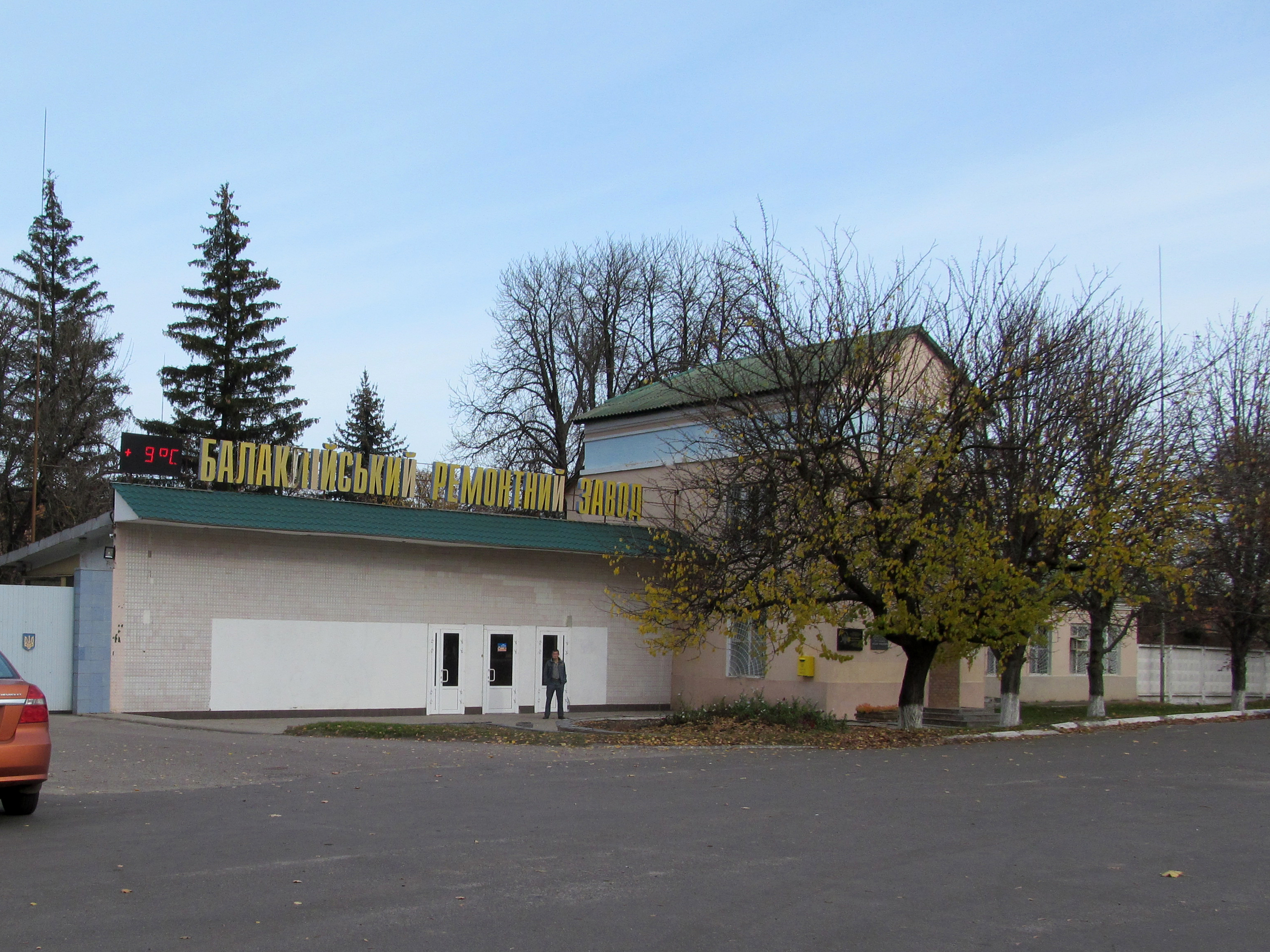 Балаклійський ремонтний завод. М. Балаклія Харківської області, вул. Стадіонна, 1 Фото було зроблене під час поїздки для проведення віківишколу з редагування Вікіпедії у Балаклійській центральній районній бібліотеці для бібліотекарів міста Балаклія та Балаклійського району в рамках проекту «ВікіХарківщина» (м. Балаклія, 3 листопада 2018 року).